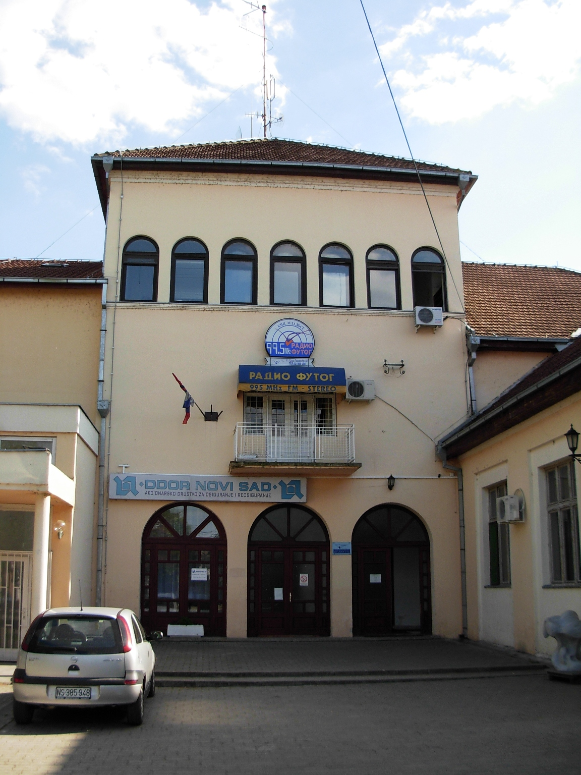 Zgrada u kojoj se nalazi Radio Futog.